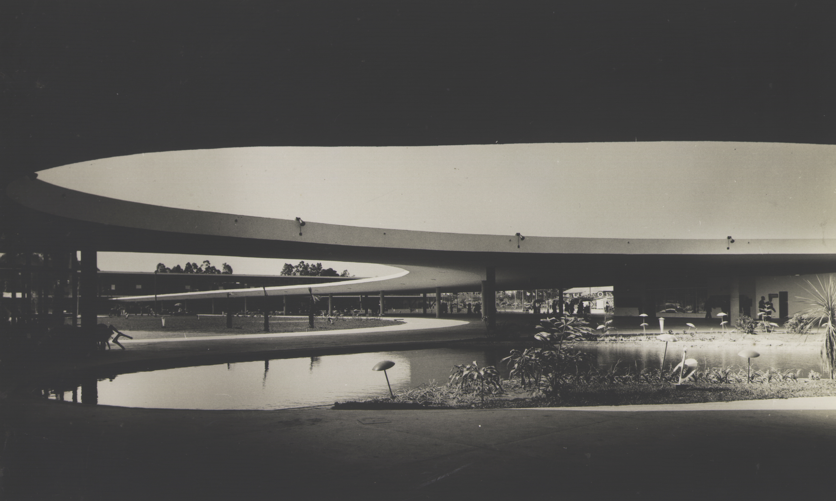 Obra que integra o acervo do Museu Paulista da USP. Coleção Werner Haberkorn